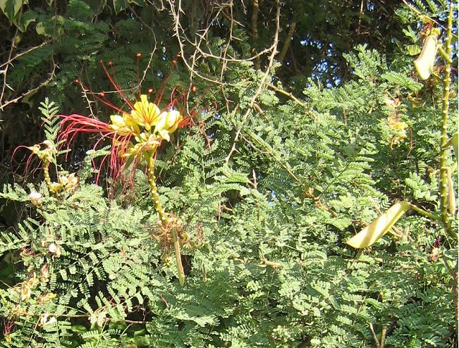 Caesalpinia gilliesii, ornamental shrub